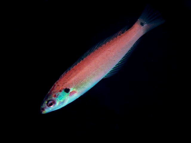 シラタキベラ Pseudocoris bleekeri